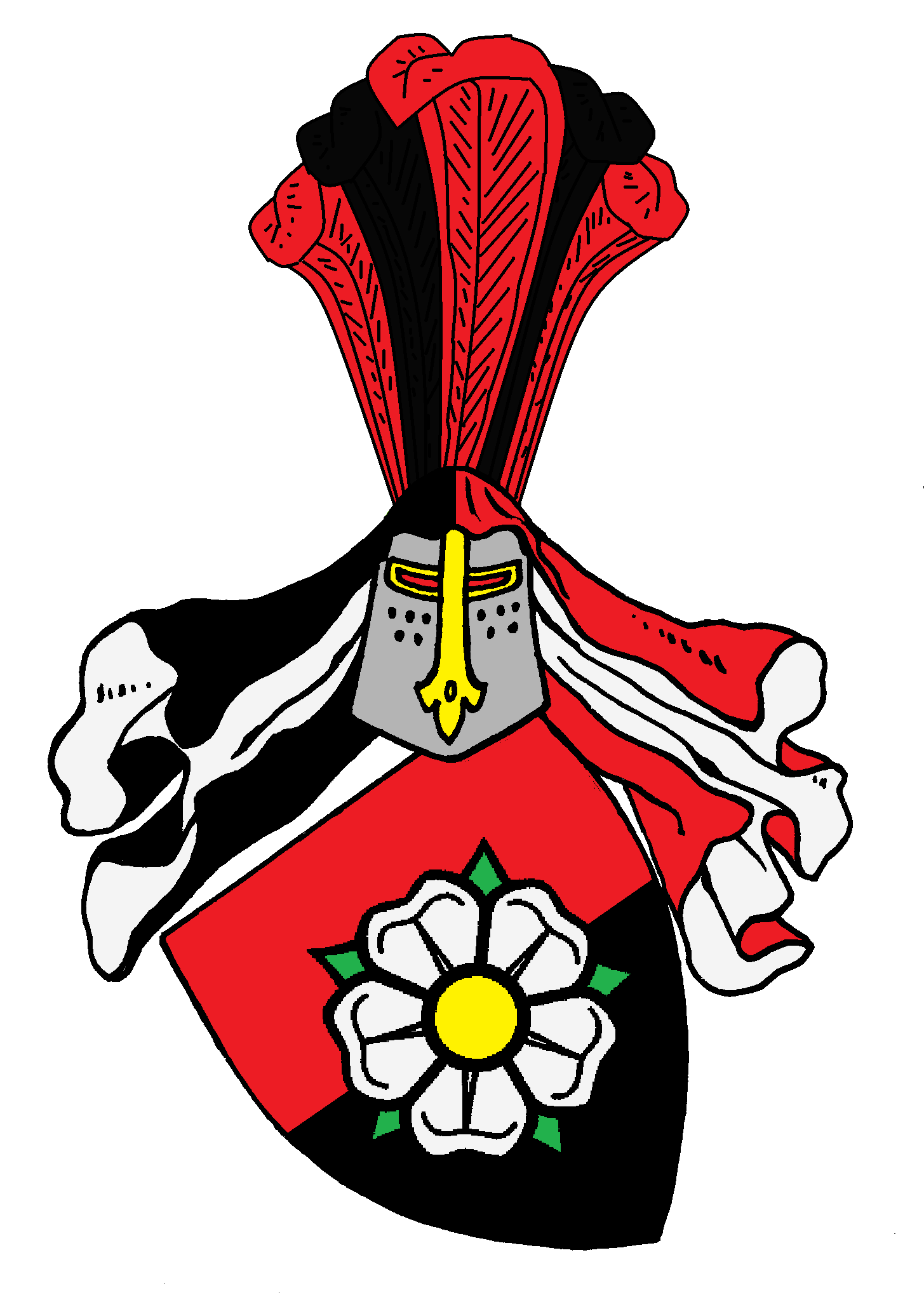 Stammwappen derer von Marenholtz, lüneburgisches Uradelsgeschlechts